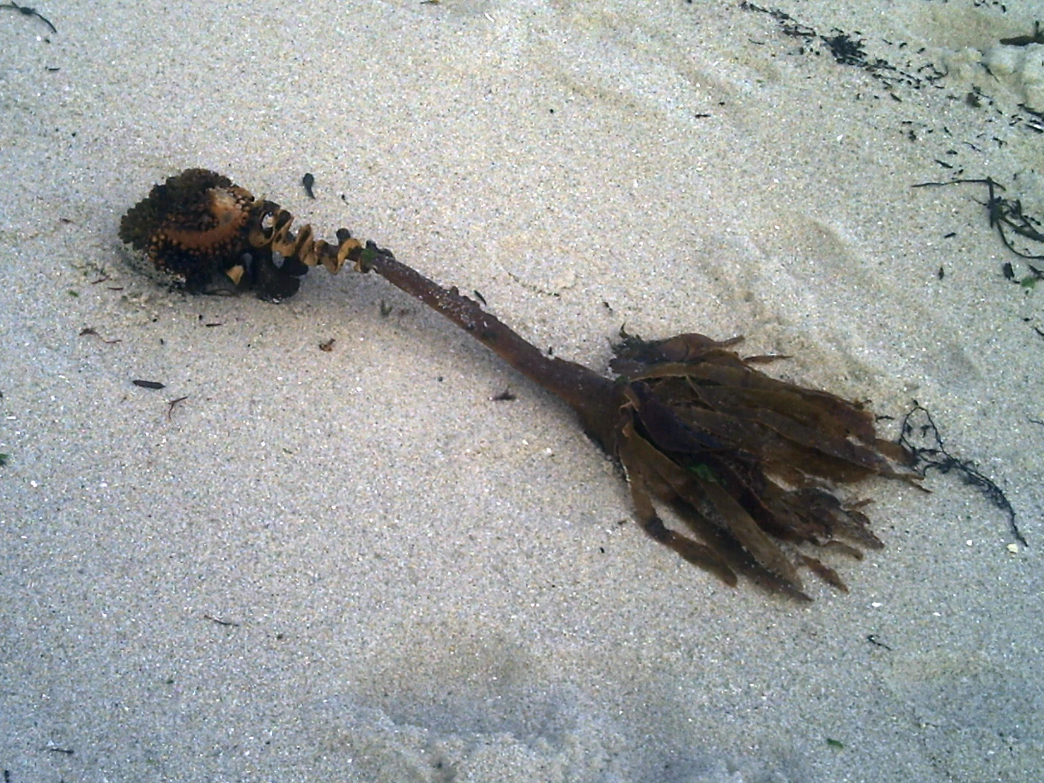 algue sur le sable